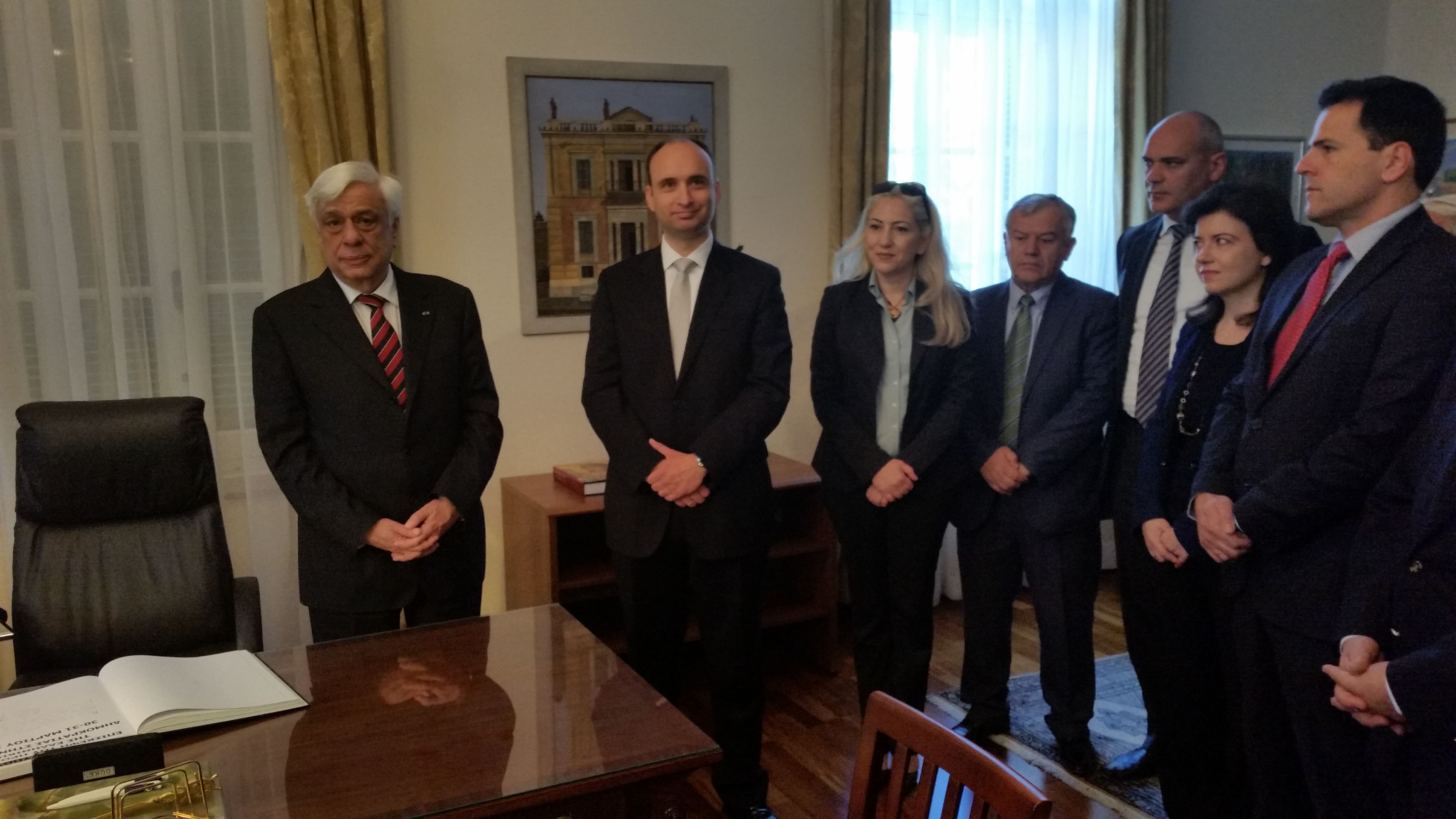 Συνάντηση Προέδρου της Δημοκρατίας κ. Π. Παυλόπουλου με στελέχη της Πρεσβείας της Ελλάδας στην Κύπρο κατά τη διάρκεια της επίσημης επίσκεψής του (30-31/3/2015).